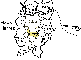 Kort der viser Ørting Sogn, Hads Herred, Århus Amt, Denmark.